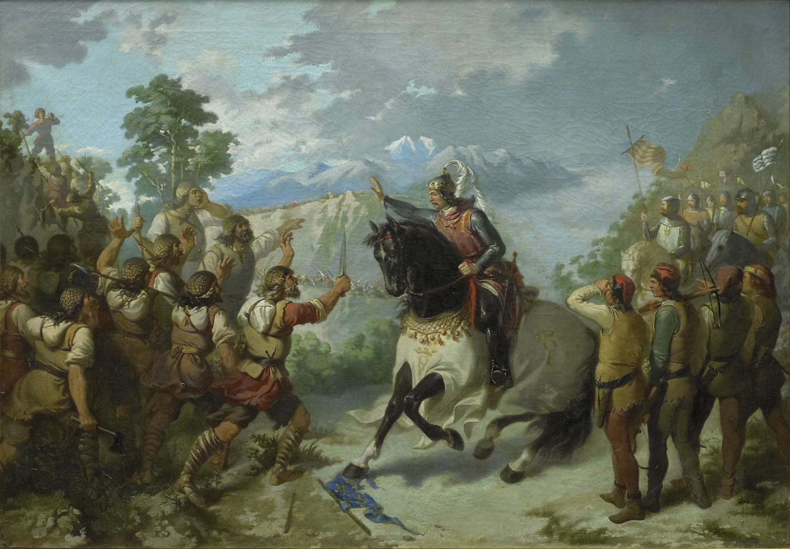 Pere el Gran al Coll de Panissars. Oli sobre tela. Museu d'Història de Catalunya. Barcelona. Catalunya. detalls: La pintura presenta un dels fets històrics esdevinguts durant el regnat de Pere II el Gran: La batalla del Coll de Panissars (30 de setembre i 1 d’octubre de 1285), conflicte que va posar punt final a la Croada declarada pel Papa Martí IV l’any 1283 contra Pere el Gran per la seva intervenció en les afers sicilians. L’exèrcit croat, format per tropes del Regne de França, del Regne de Mallorca i de la República de Gènova va ser durament atacat per les tropes de Pere II el Gran mentre disposaven la seva retirada pel nord dels Pirineus després d’haver estat derrotats davant les costes de l’Empordà per l’exèrcit català. L’escena de l’obra recull el moment en que el rei Pere ordena als almogàvers que aturin els atacs per deixar passar el rei francès, Felip III, que moribund, es bat en retirada amb les restes del seu exèrcit camí cap a França. Amb la imatge del Canigó al fons, el rei Pere apareix en primer pla a cavall acompanyat de les seves tropes.El cavall trepitja un estendard esquinçat, amb la flor de lis, emblema dels Anjou. Al costat esquerra de l’escena se situa el grup d’almogàvers, amb la seva singular indumentària: camisa, polaines, avarques i sarró. La pintura de temàtica històrica va ser un gènere molt difòs a partir dels anys quaranta del segle xix a Catalunya, fruit del projecte de recuperació de la identitad cultural i nacional impulsada pel moviment de la Renaixença. Els intel·lectuals d’aquest moviment reivindiquen el passat medieval com el moment històric en què Catalunya havia gaudit d’una real personalitat política. La figura de Pere el Gran serà objecte de veneració pel fet de representar la consolidació de l’expansió territorial inciada pel seu pare Jaume I, i l’enfortiment de les institucions de govern: Les Corts i el Consell de Cent.